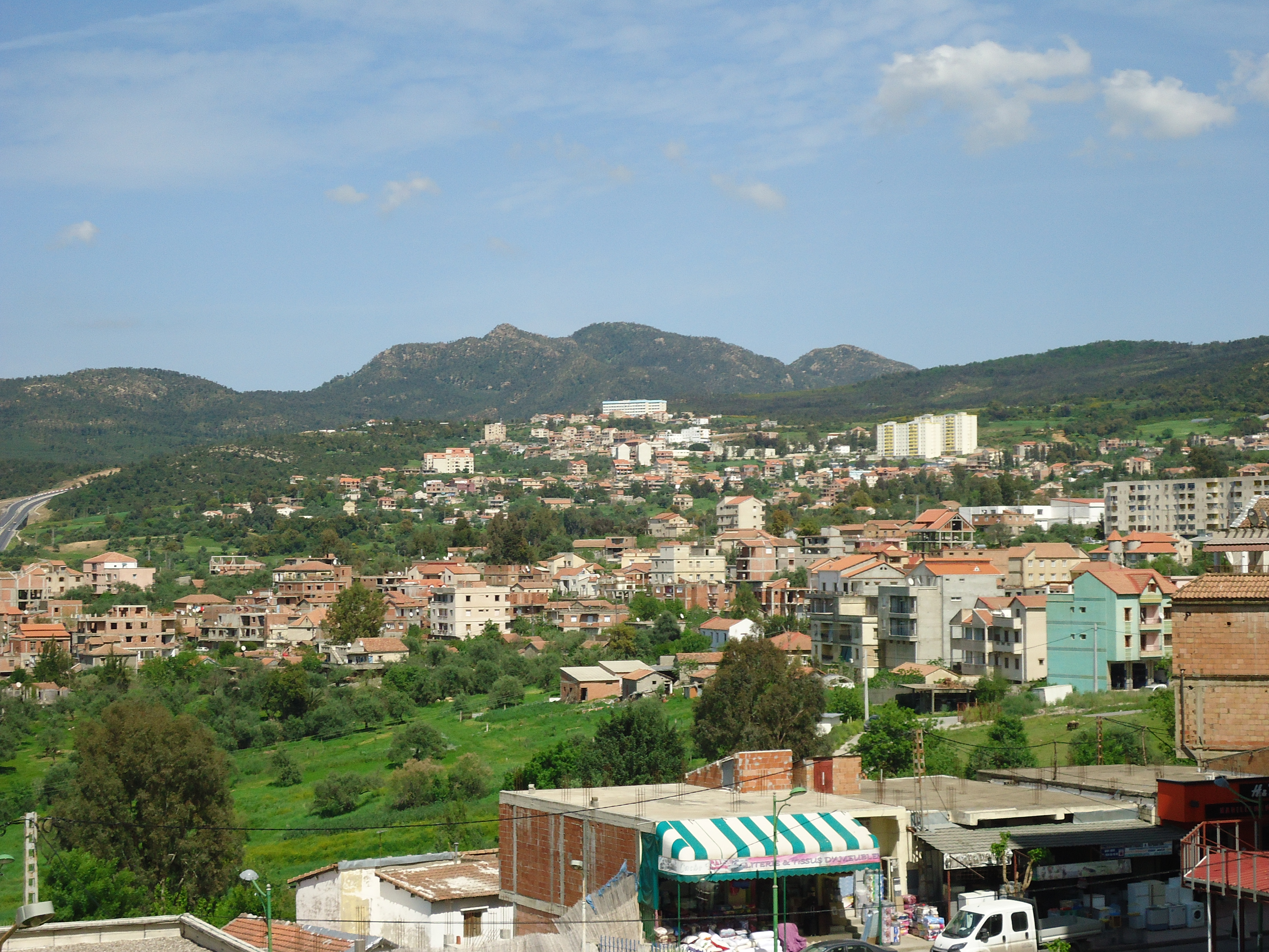 Taqbaylit: vue sur azazga 2016